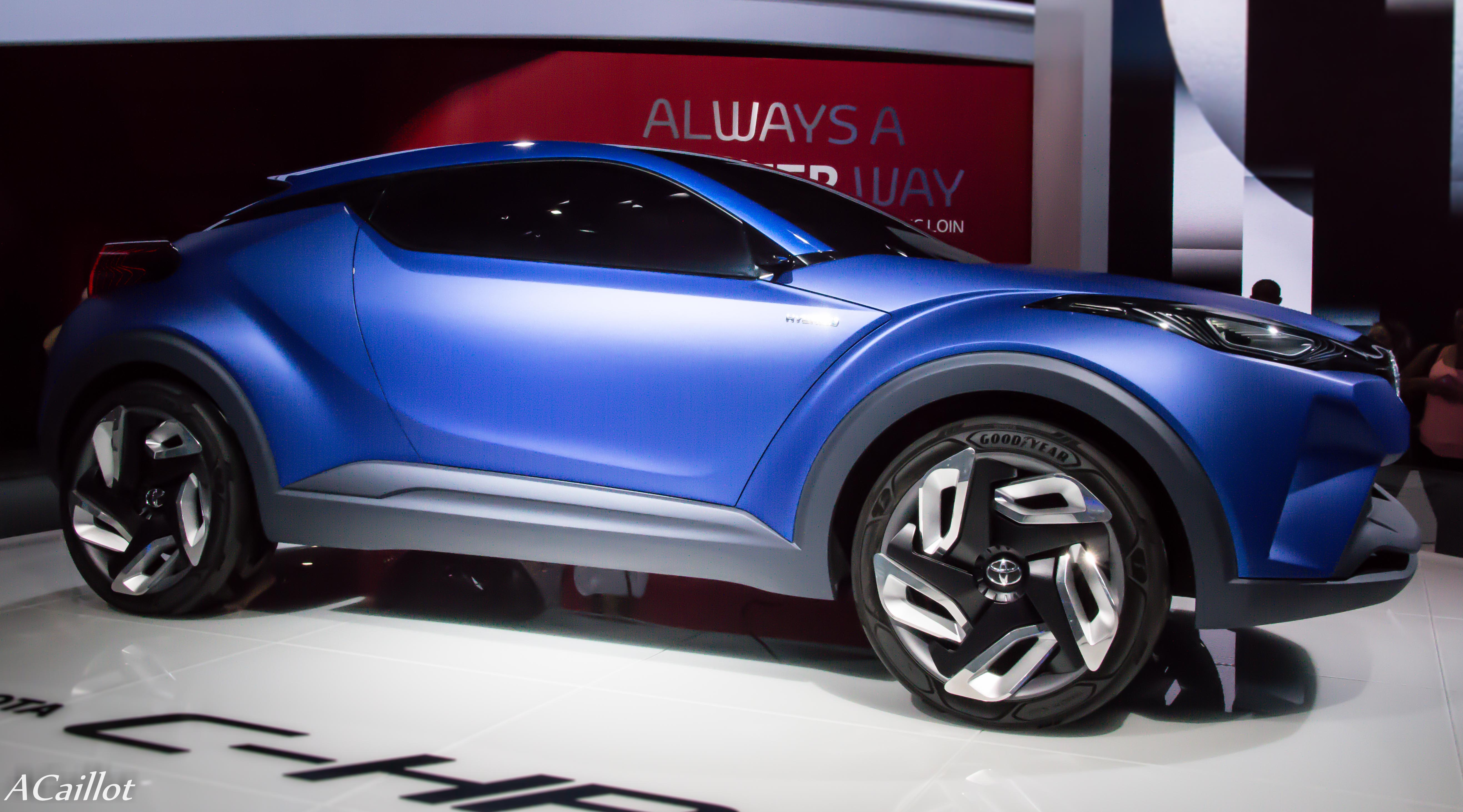 Mondial de l'auto, Paris, 2014